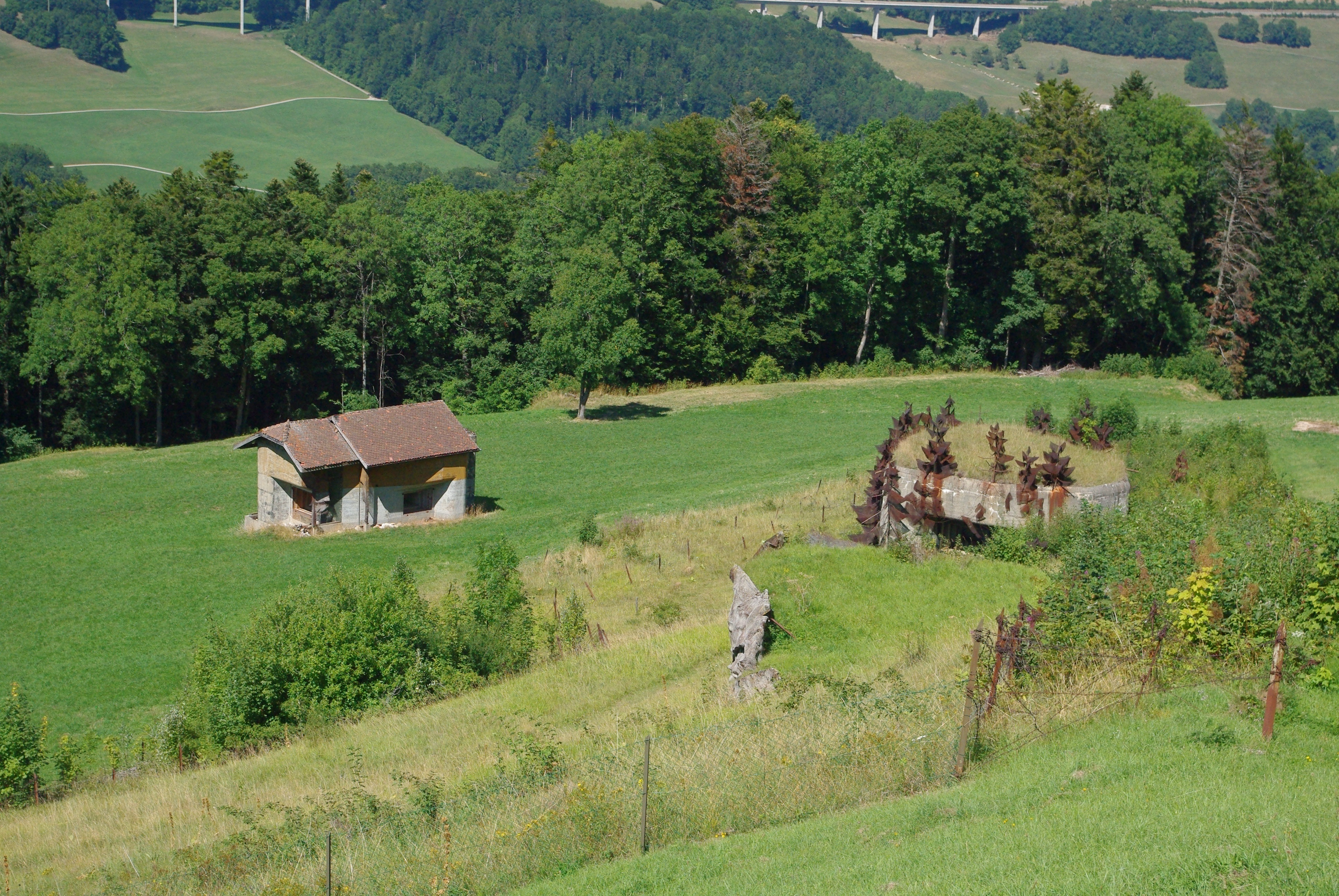 Casemates au fort de Pré-Giroud lors de la sortie photo du 18-08-2012